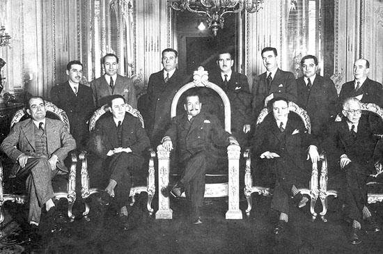 Fotografía de Pedro Aguirre Cerda, Presidente de Chile (1938-1941) y sus ministros de Estado hacia 1940